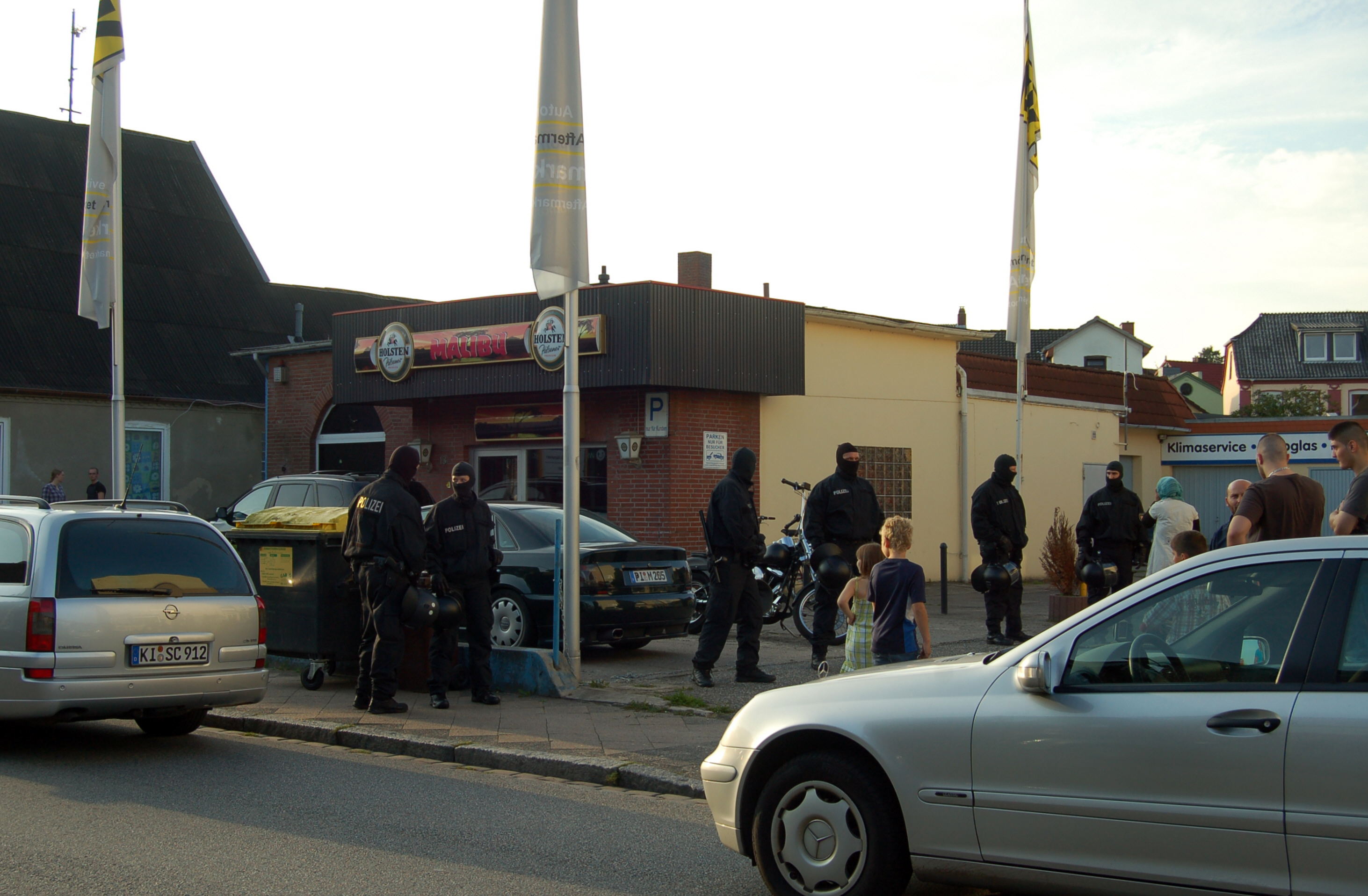 SEK Einsatz bei einer Drogen-Razzia in Uetersen, dabei wurden Teile der Innenstadt bis in die Nacht gesperrt und mehrere mutmaßliche Täter festgenommen. Insgesammt wurden 500 Gramm besonders reines Heroin, vier Kilogramm gestrecktes Heroin sowie 23 445 Euro in einem Geldversteck sichergestellt.